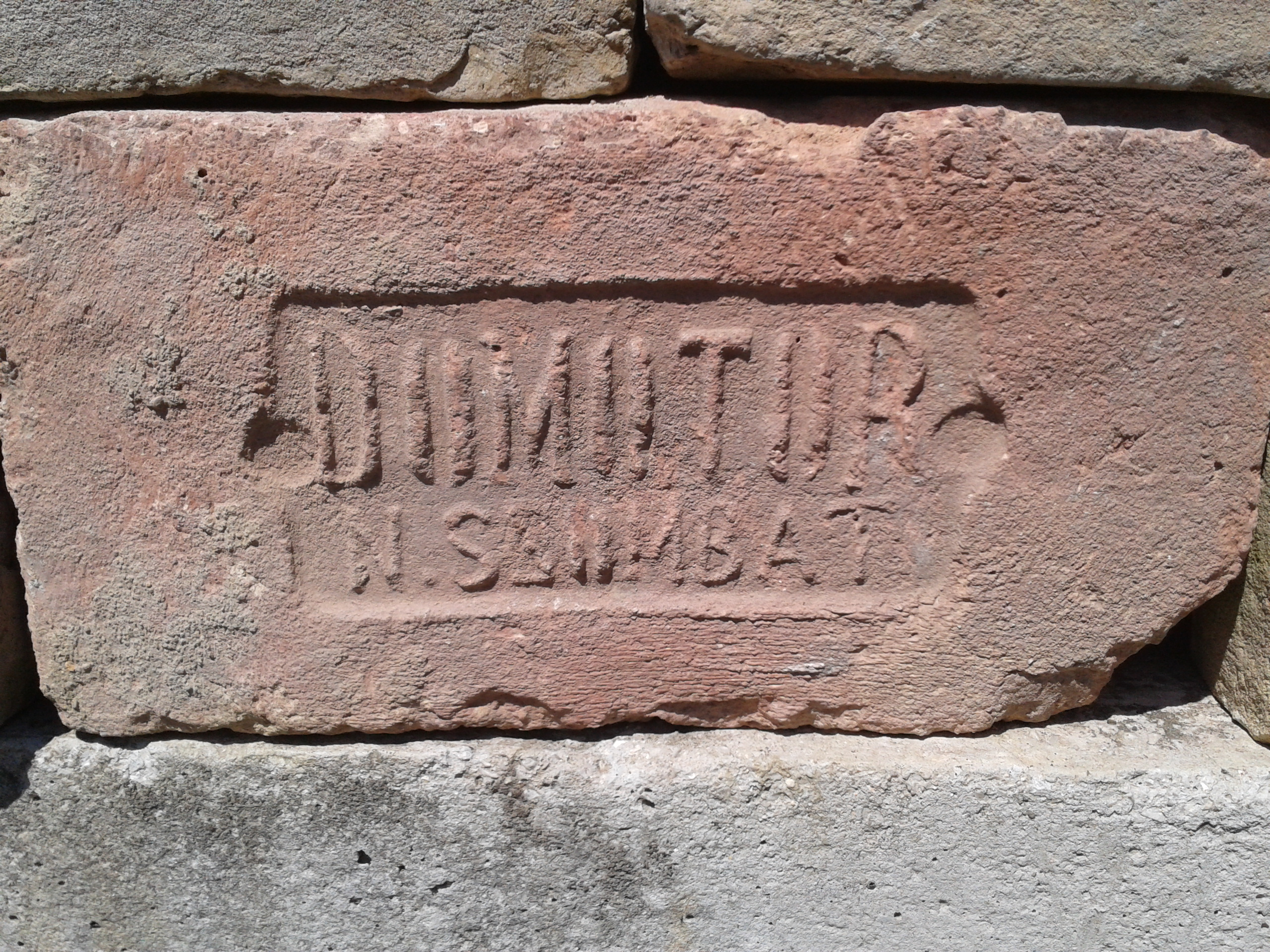 Tehla vyrobena v Domotorovej tehelni, Trnava.